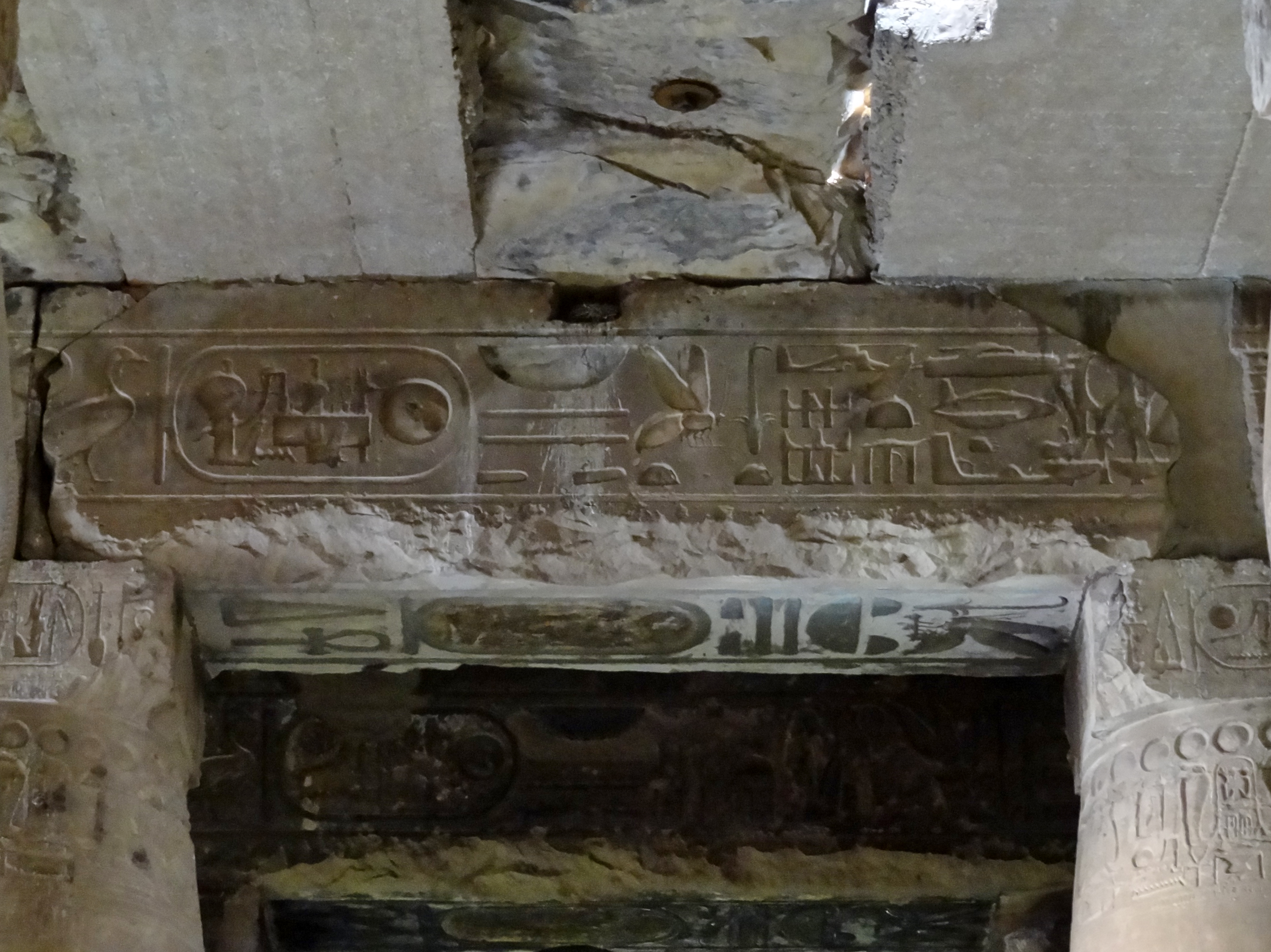 Architrav mit Hieroglyphen hinter dem Eingang zum Totentempel des Sethos I. von Abydos, Ägypten